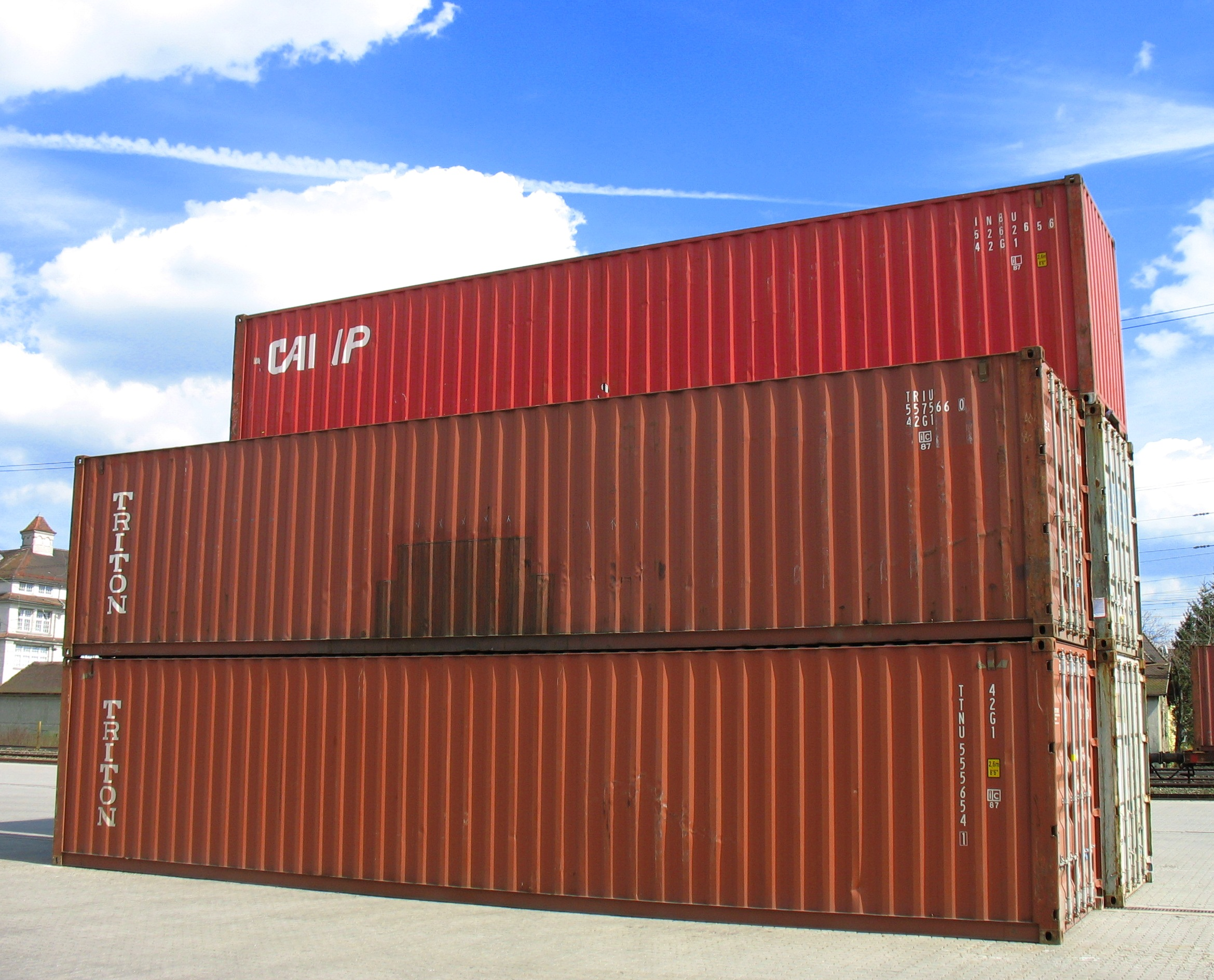 Container, Bahn-Güterterminal Augsburg Oberhausen